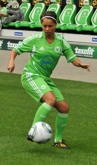 Action shot